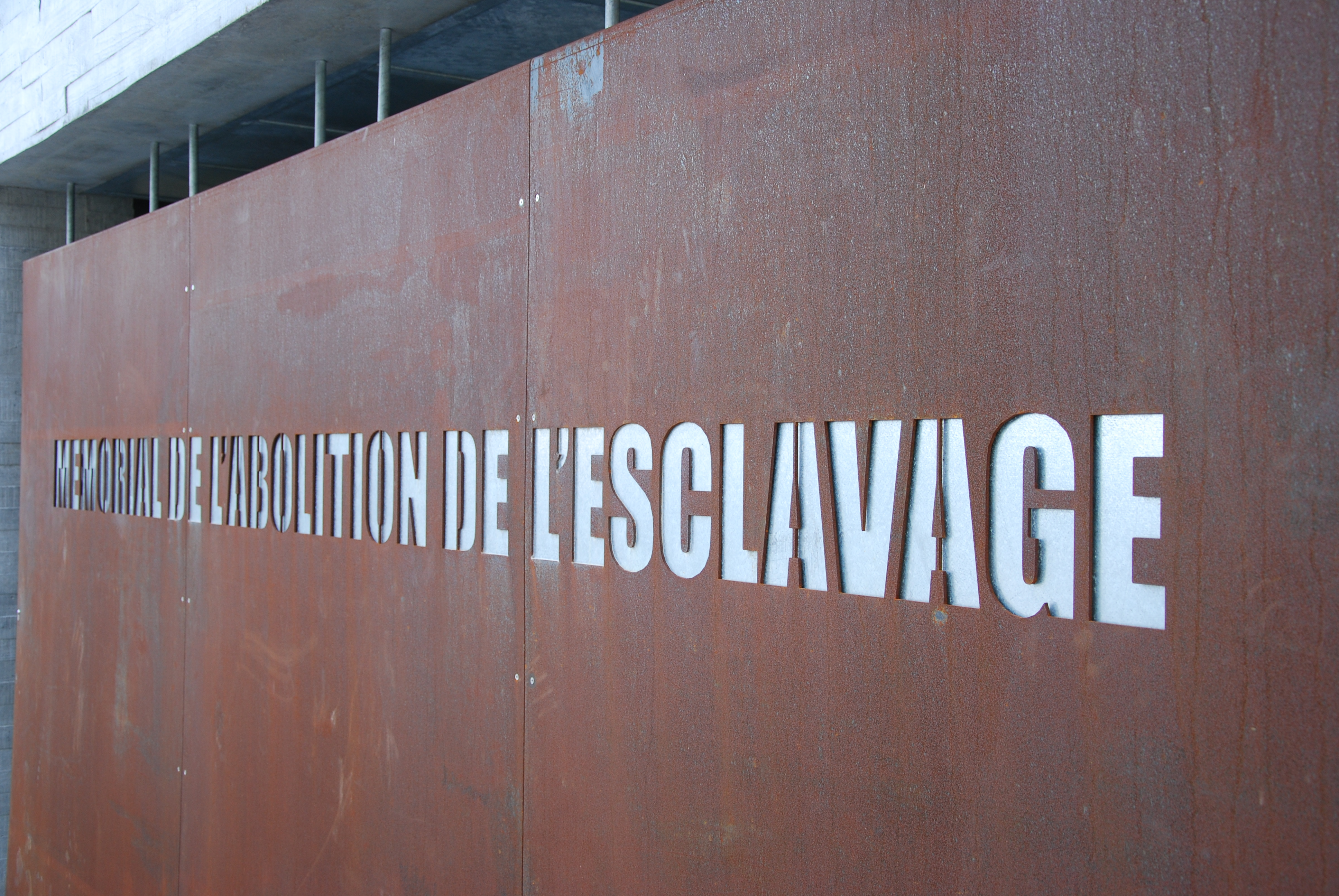 Inauguration du Mémorial de l'abolition de l'esclavage de Nantes, le 25 mars 2012.